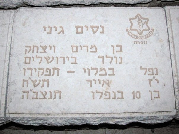 בקבר האחים ללוחמי העיר העתיקה בתש"ח